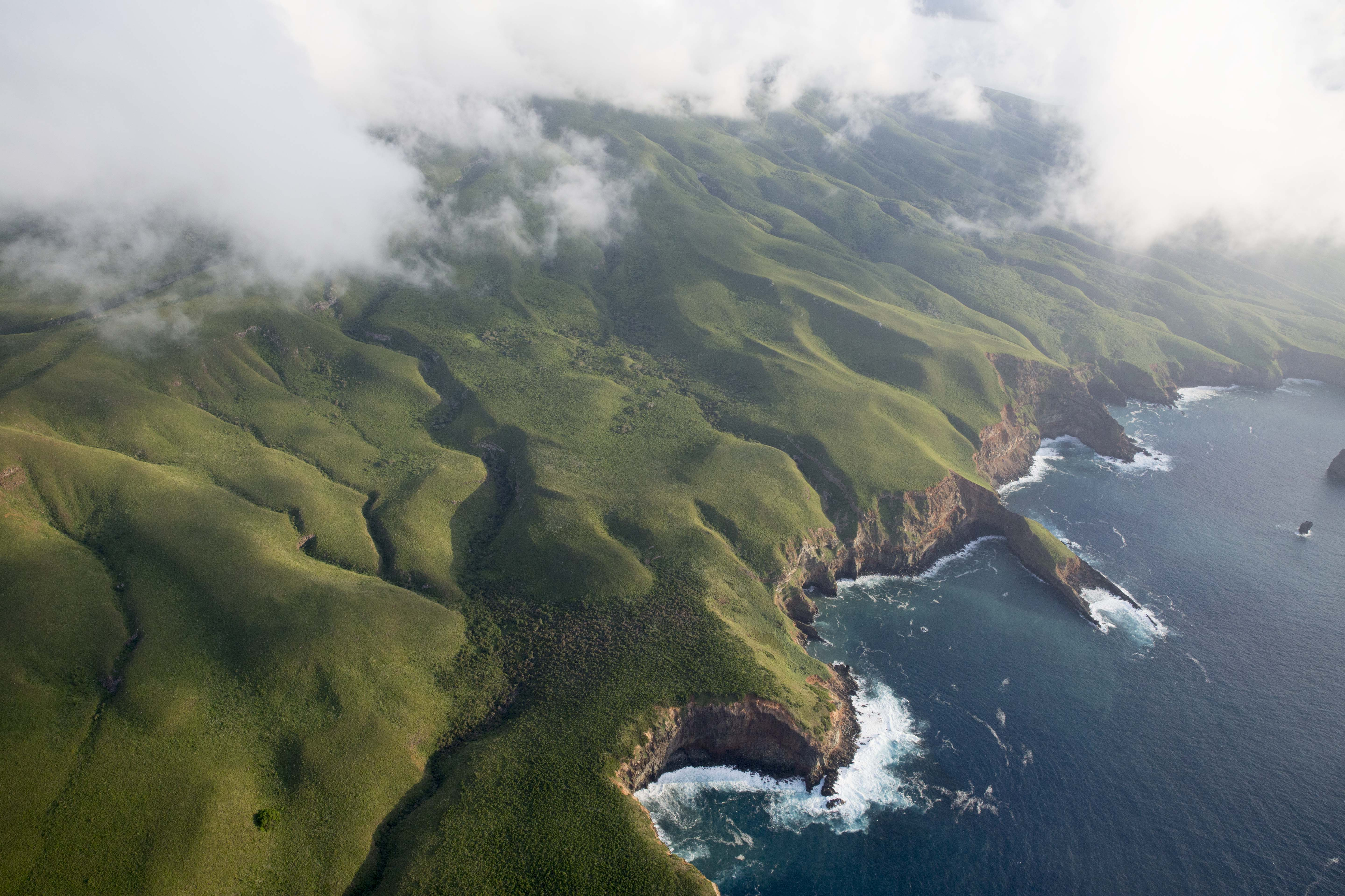 Declaratoria Oficial de Patrimonio Mundial de la Humanidad del Archipiélago de las Islas Revillagigedo